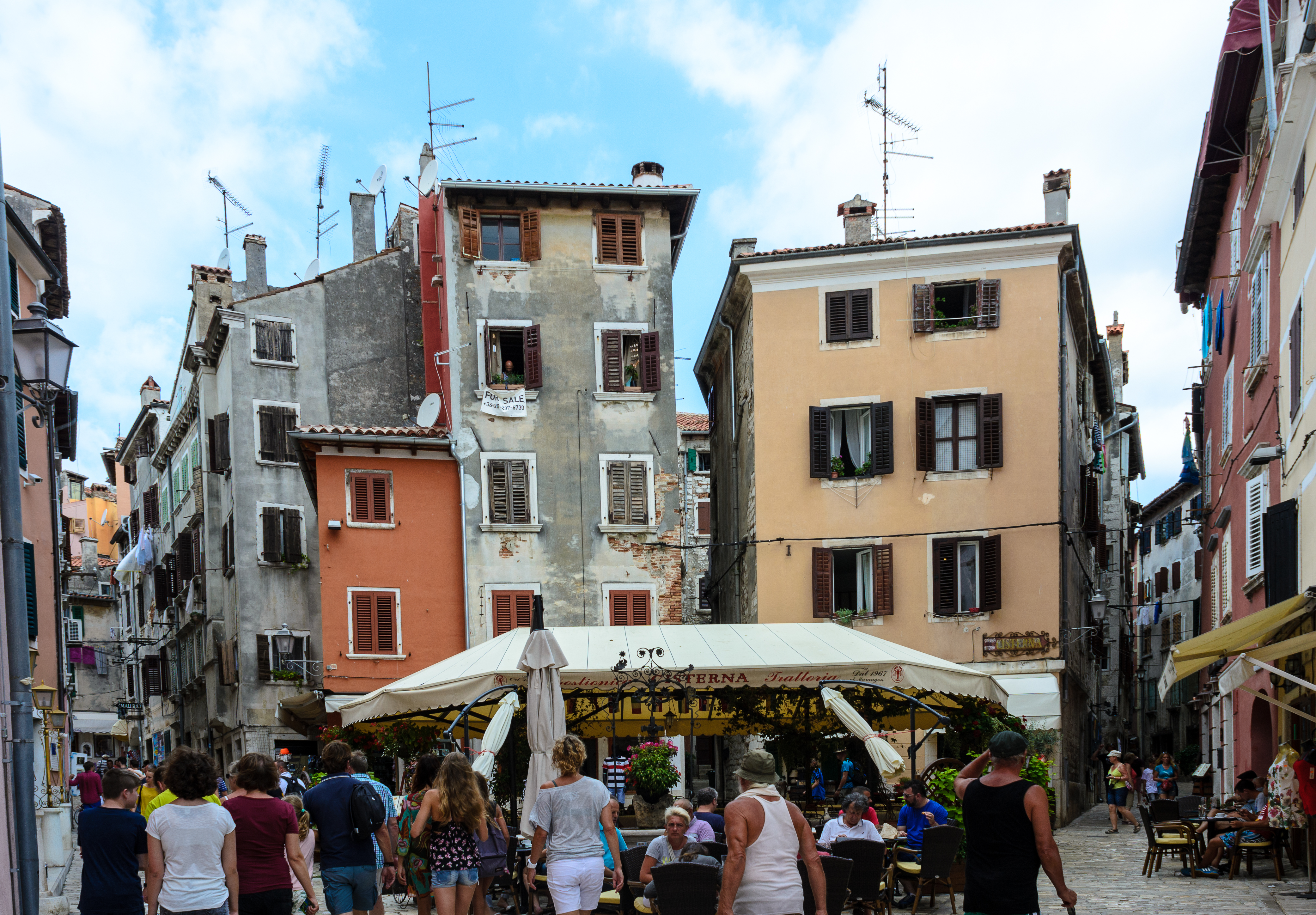 Rovinj